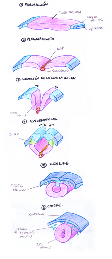 El dibujo muestra los diferentes pasos que lleva a cabo la placa neural para su transformación a tubo neural y epidermis.